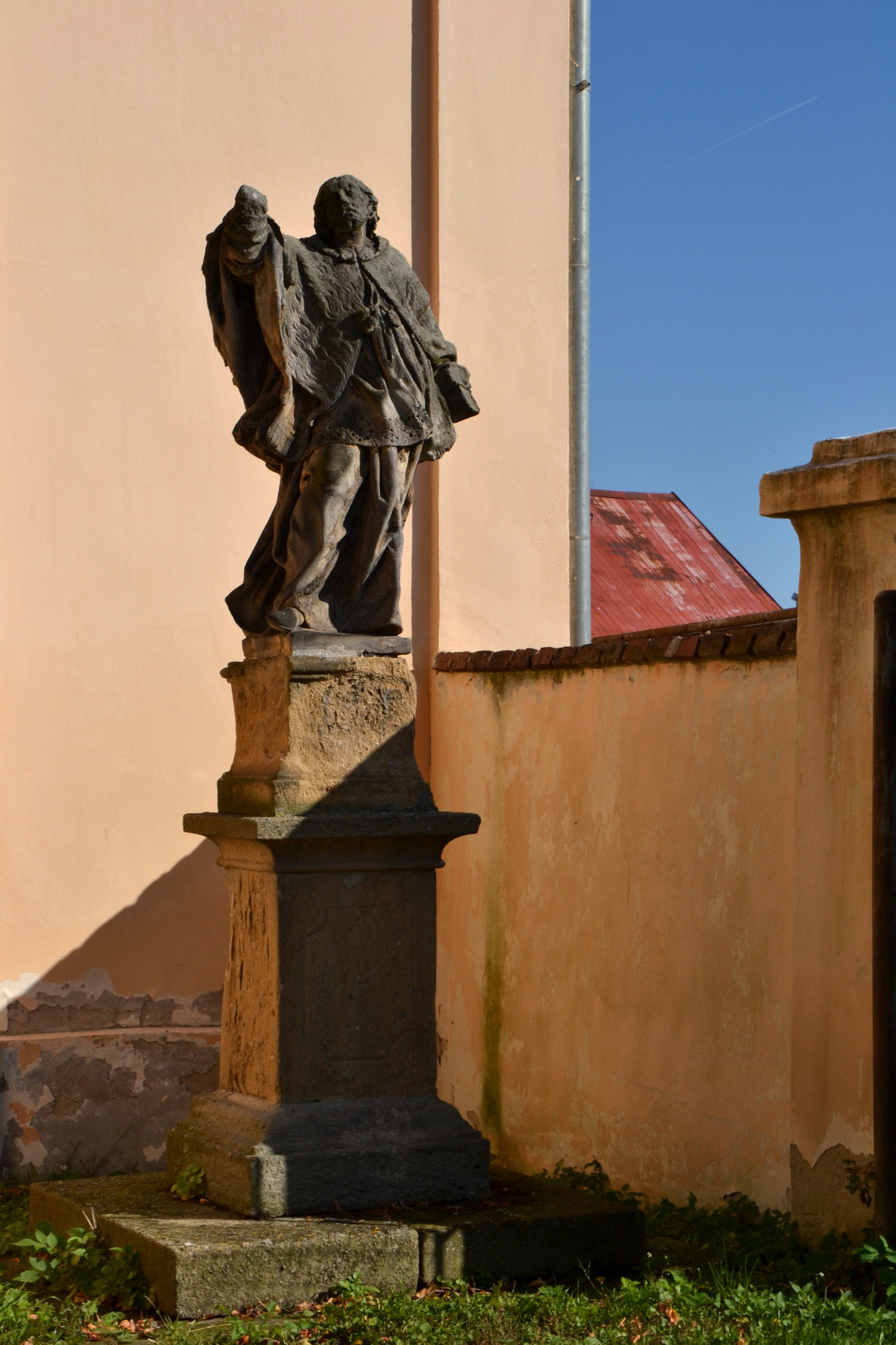 Socha svatého Jana Nepomuckého, před kostelem, Veliká Ves